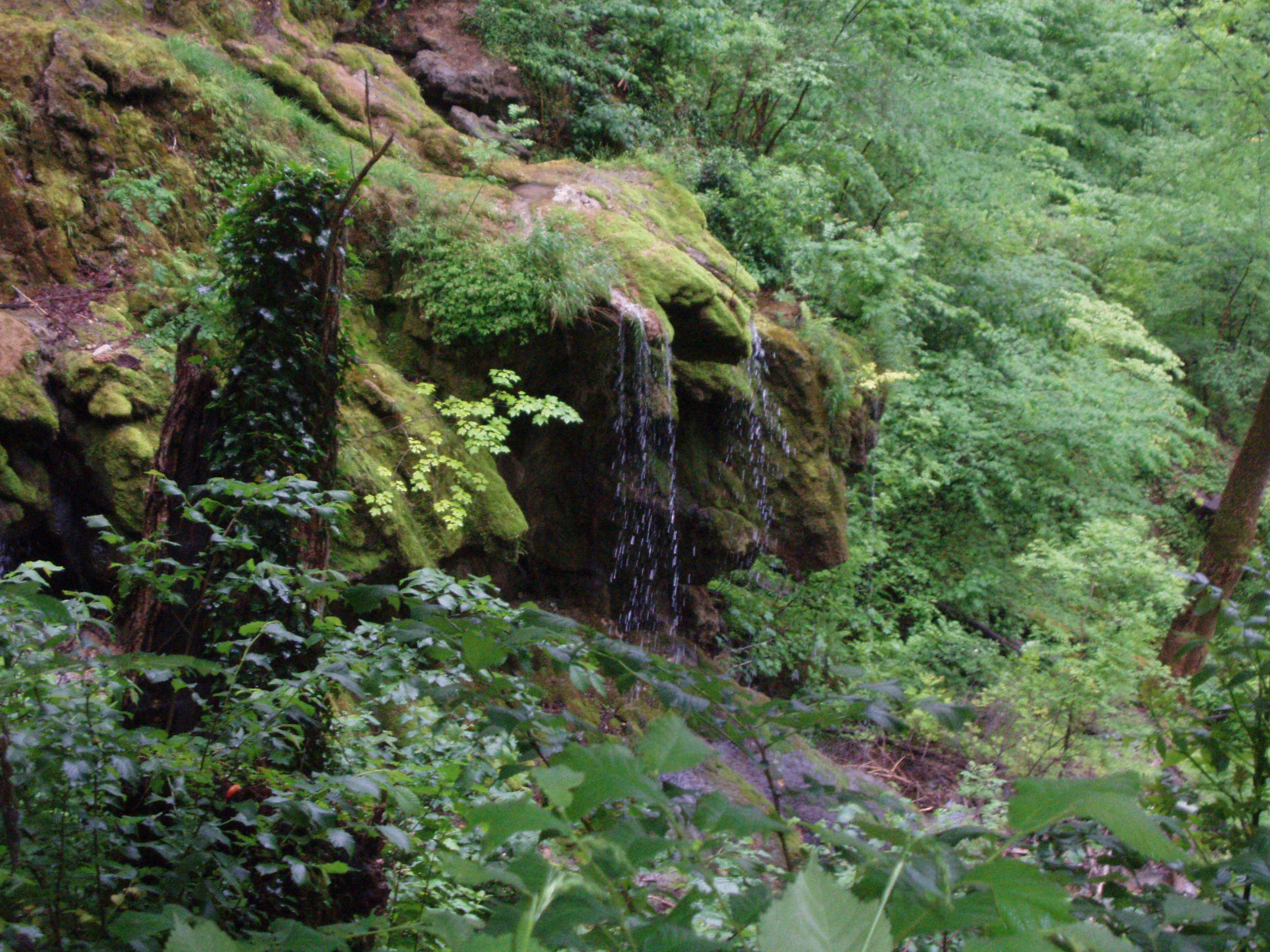 Neidlinger Wasserfall, Schwäbische Alb, Baden-Württemberg, Deutschland